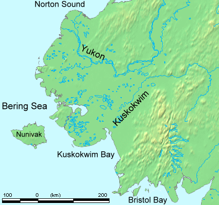 Yukon-Kuskokwim-Delta, Alaska